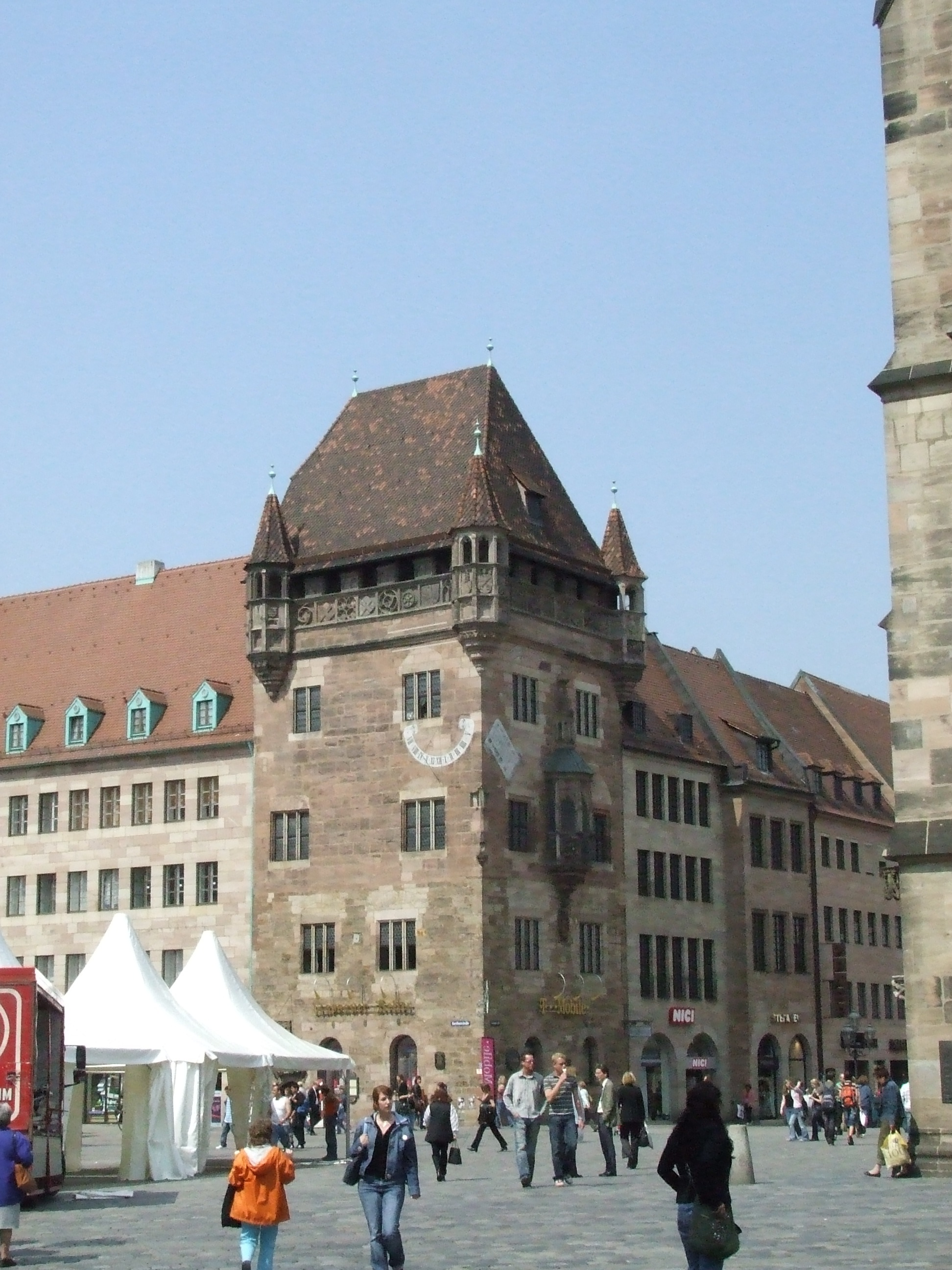 Stadt Nürnberg, das Nassauer Haus gegenüber der Lorenzkirche, Karolinenstraße 2, ein mittelalterliches Turmhaus, Blick von Südosten, Frühjahr